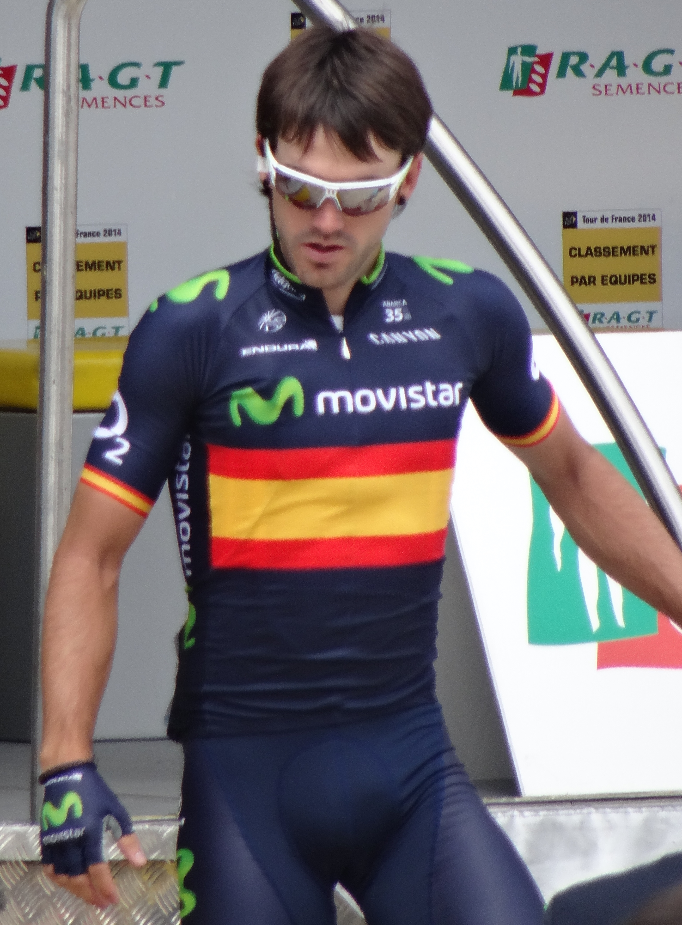 Reportage photographique réalisé le mardi 8 juillet à l'occasion du départ de la quatrième étape du Tour de France 2014 au Touquet-Paris-Plage, Nord-Pas-de-Calais, France.